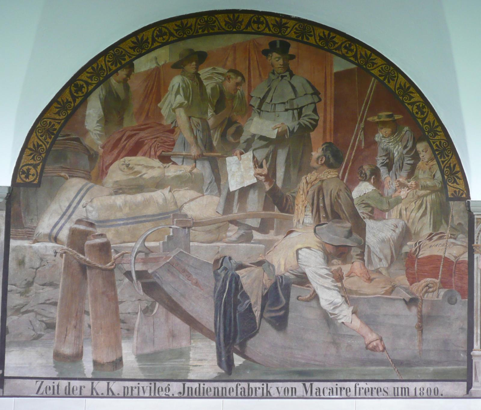 Wandbild im Kreuzgang des ehemaligen Insel-Klosters in Konstanz zur Indienne-Fabrikation